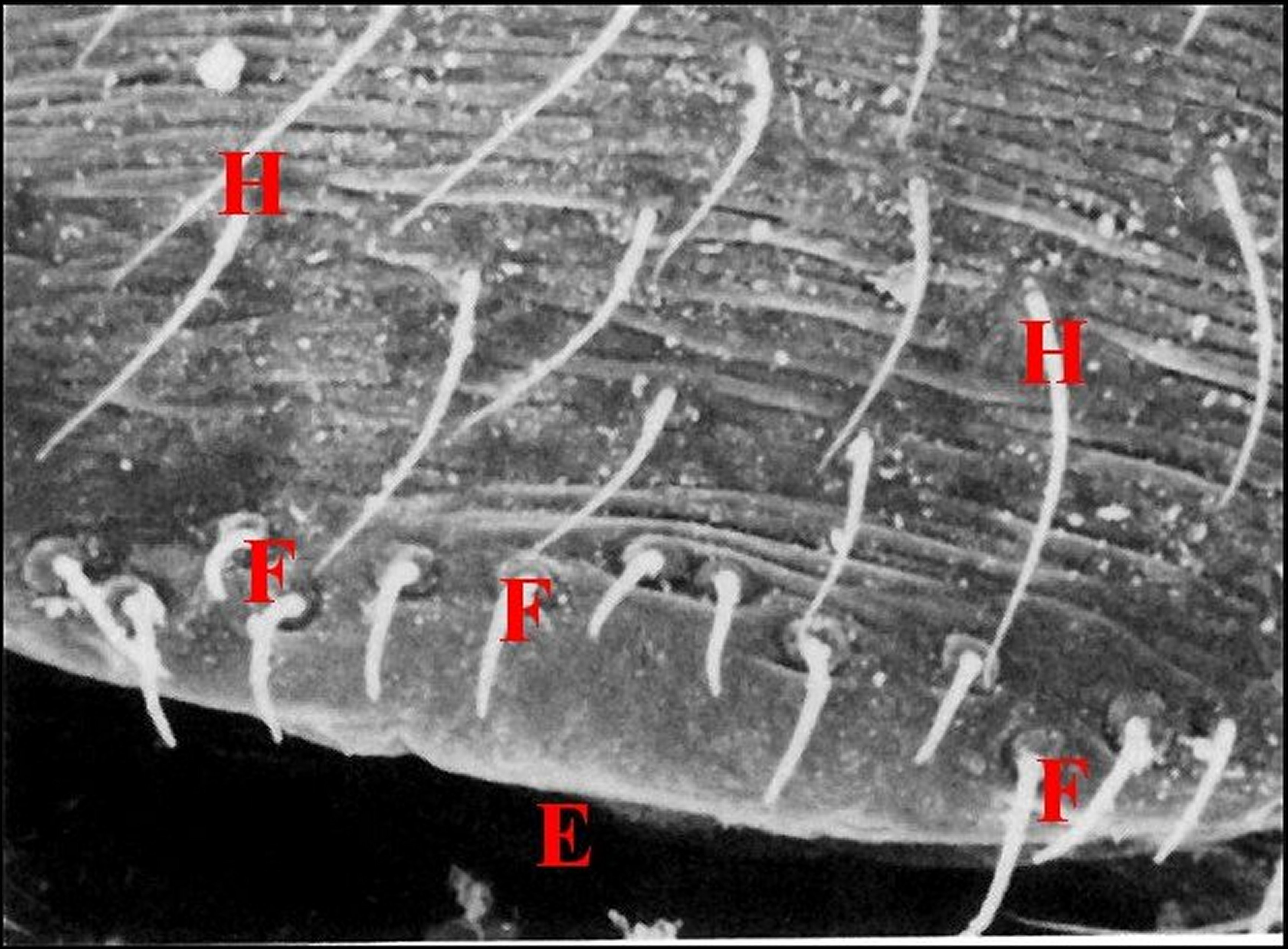 Ensemble des fusules épigastriques prégonoporales de Nesticus cellulanus mâle. Microscope électronique à balayage.